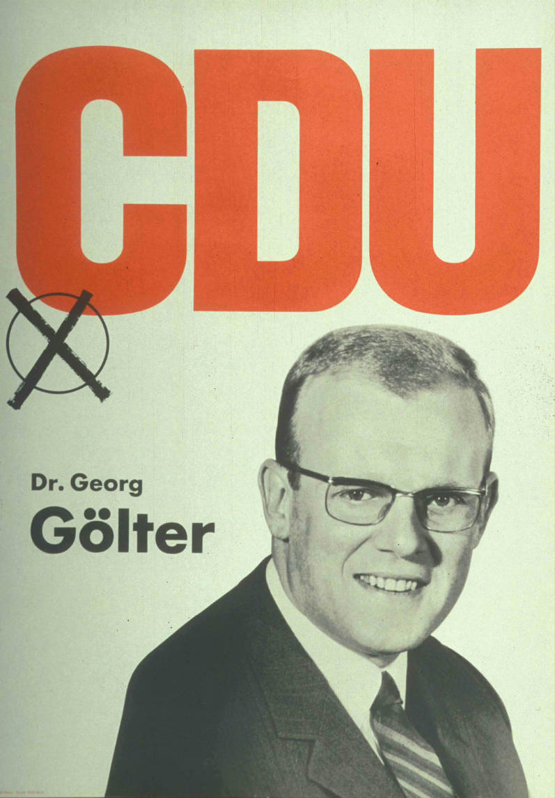 CDU Dr. Georg Gölter Abbildung: Porträtfoto -Stimmkreuz Plakatart: Kandidaten-/Personenplakat mit Porträt Auftraggeber: CDU Bonn Drucker_Druckart_Druckort: KVD Köln Objekt-Signatur: 10-001 : 1302 Bestand: Plakate zu Bundestagswahlen (10-001) GliederungBestand10-18: Plakate zu Bundestagswahlen (10-001) » Die 6. Bundestagswahl am 28. September 1969 » CDU » Mit Porträtfoto Lizenz: KAS/ACDP 10-001 : 1302 CC-BY-SA 3.0 DE